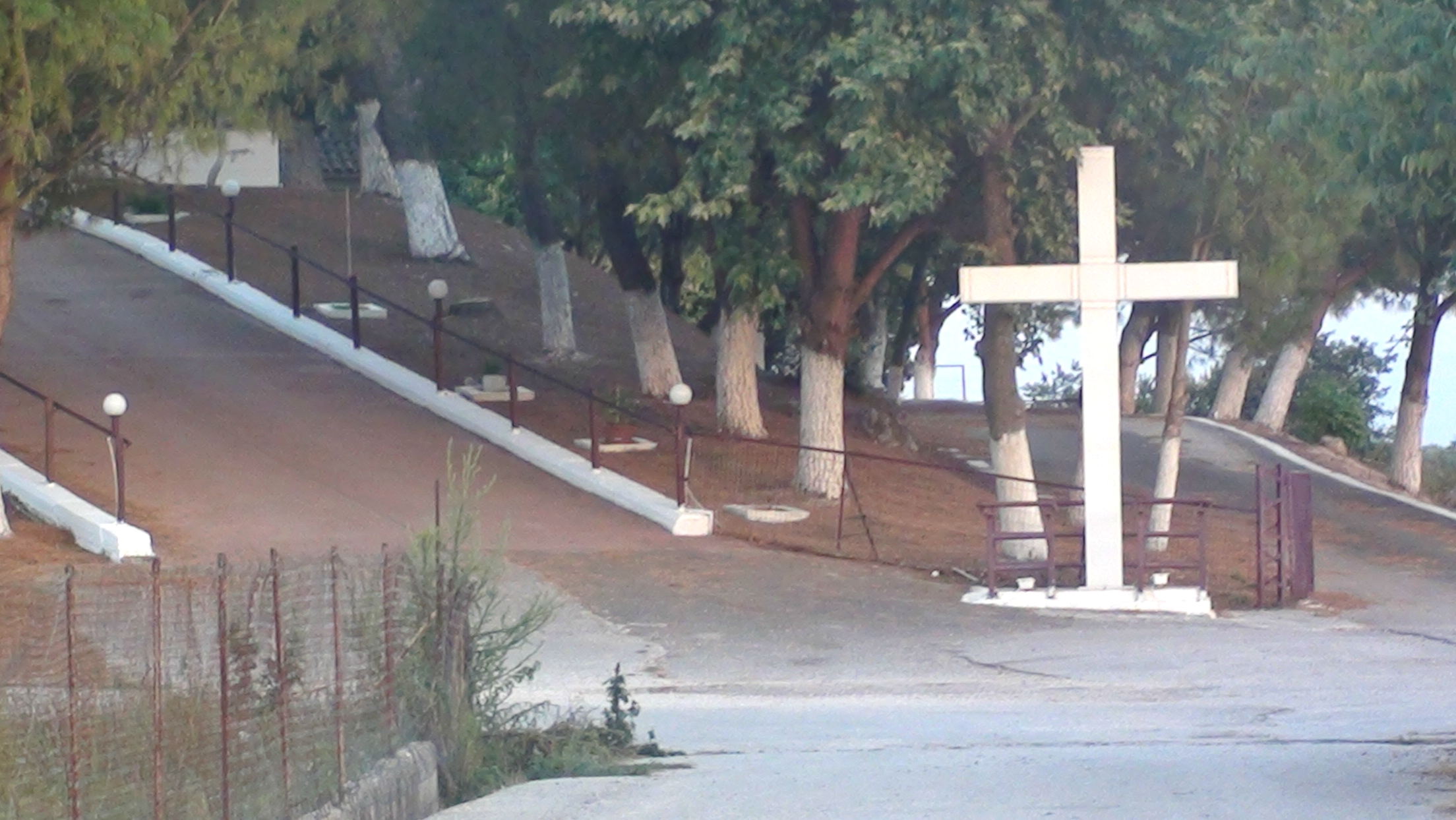 Η κεντρική είσοδος της εκκλησίας του χωριού.